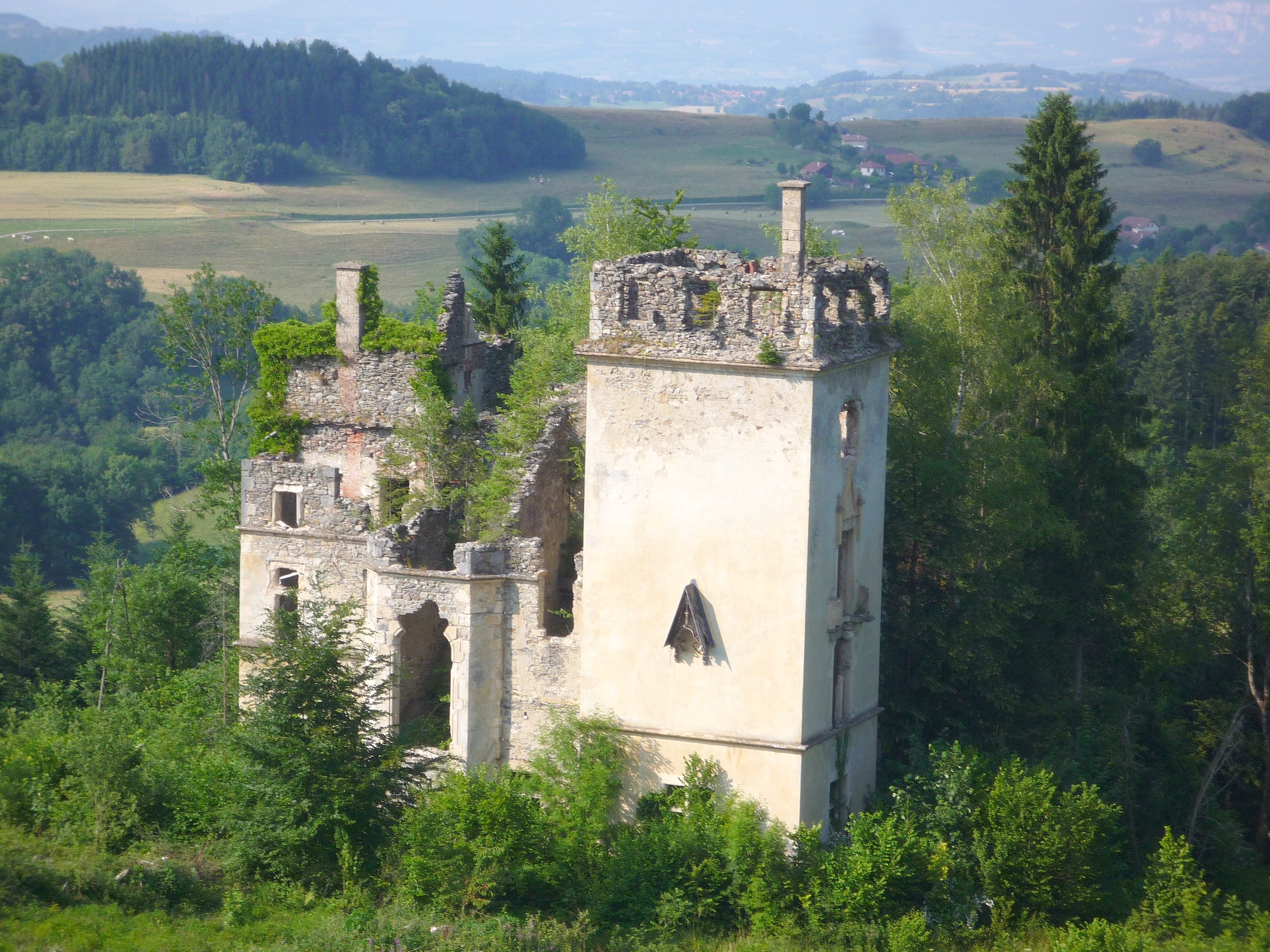 Ruines du Château Descours à Saint-Sixte. Commune de Merlas (Isère, France) Juillet 2013